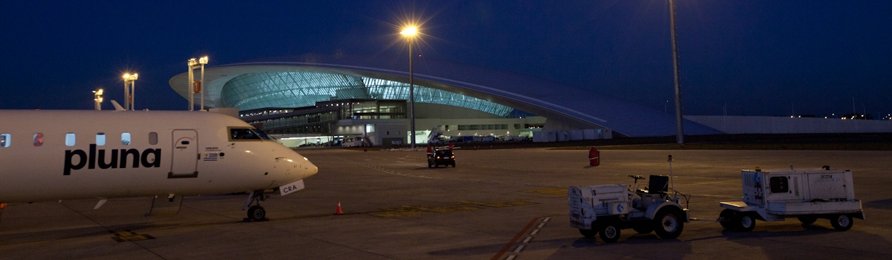 Pluna, aeropuerto internacional de Carrasco, Uruguay.